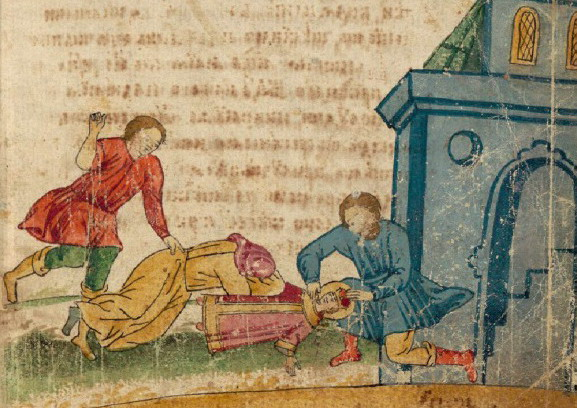 «Сборник житий и богослужебных последований Угличским святым» XVIII века. В состав рукописного Сборника житий и богослужебных последований Угличским святым входит лицевое Житие святого мученика Димитрия Угличского с 12 миниатюрами замечательной красоты. Рукопись была создана в Угличе либо в Угличском районе не ранее 1784-1786 годов.